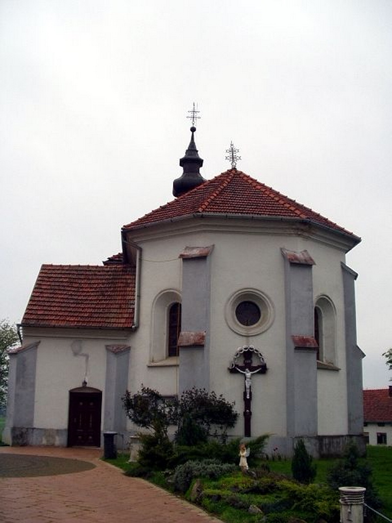 Gornji Draganec - Church of BD Marije